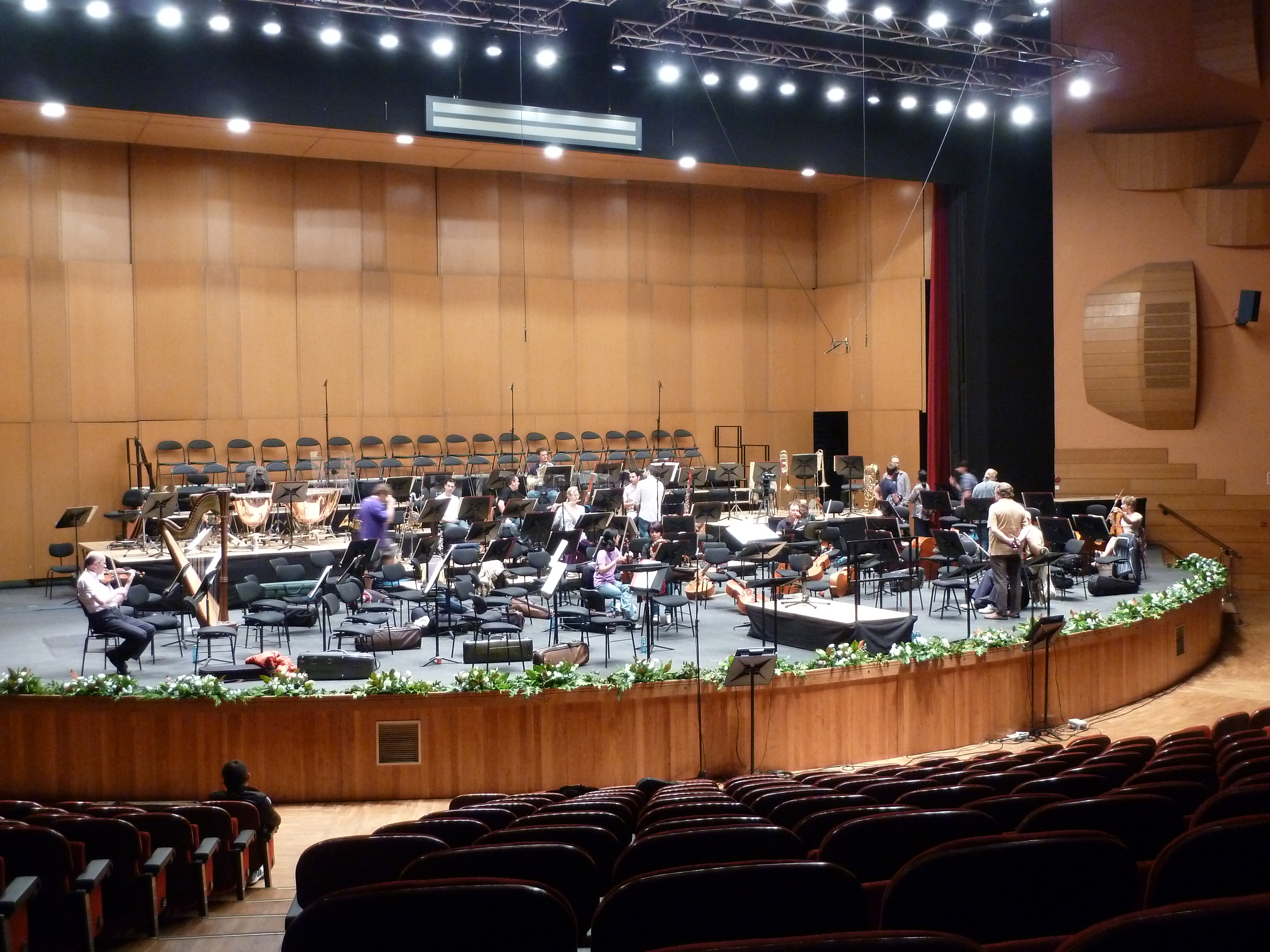 Ensaio da ópera Tristán e Isolda no Palacio da ópera da Coruña.